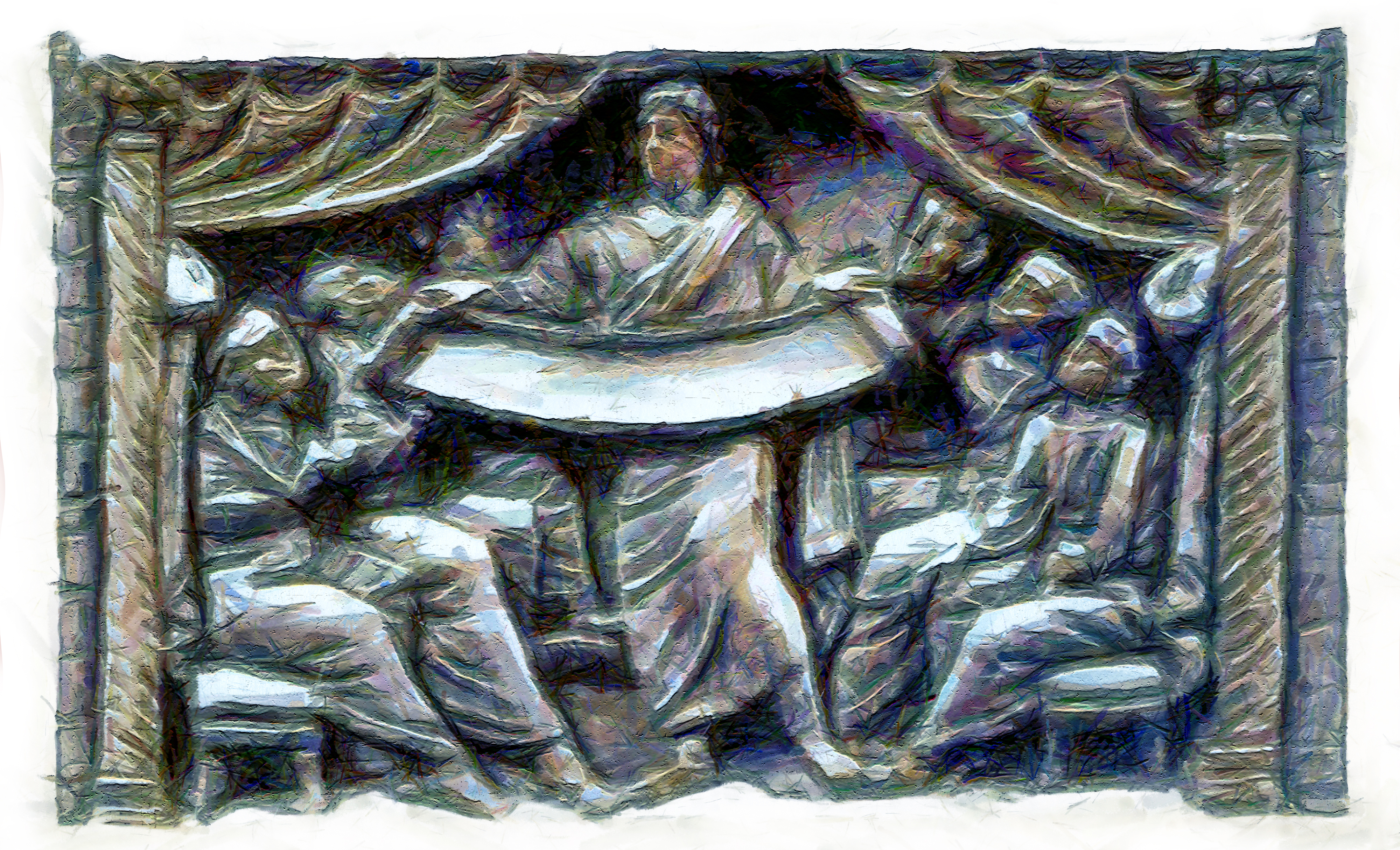 Wikimediasse laetud autori ja autoriõiguste valdaja Mart Sanderi poolt.